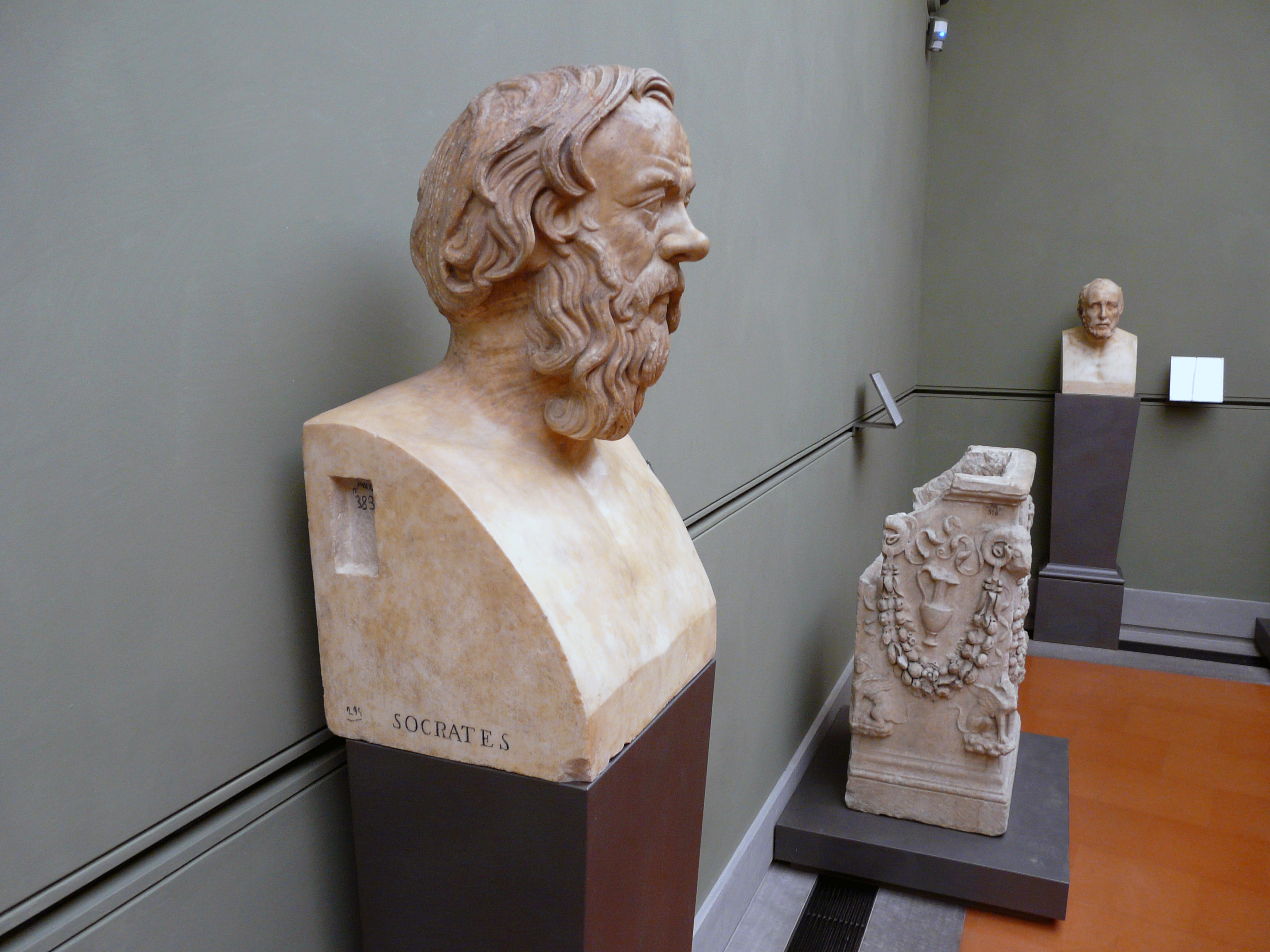 Сократ